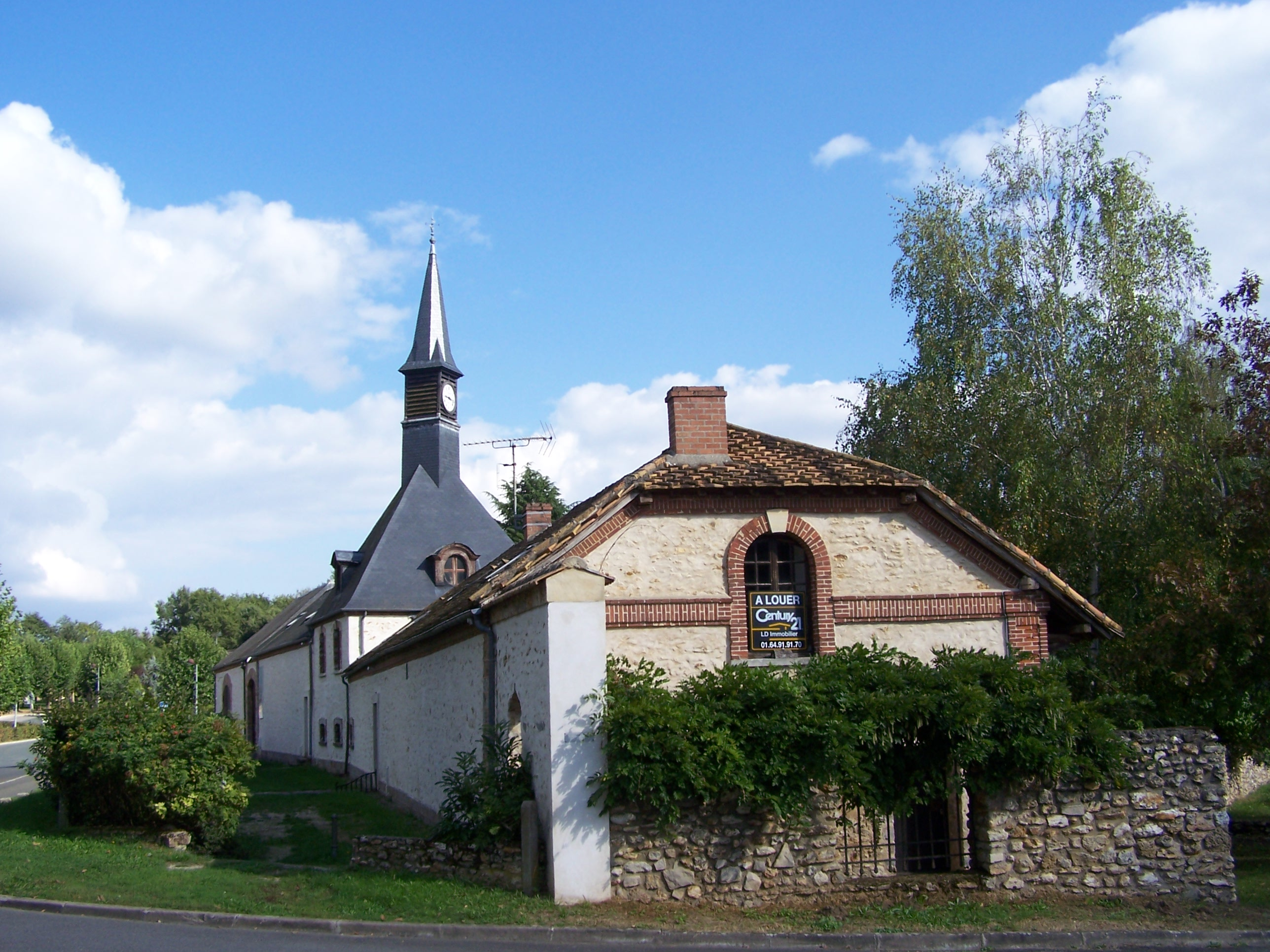 Louveterie du château de Bonnelles (Yvelines, France)